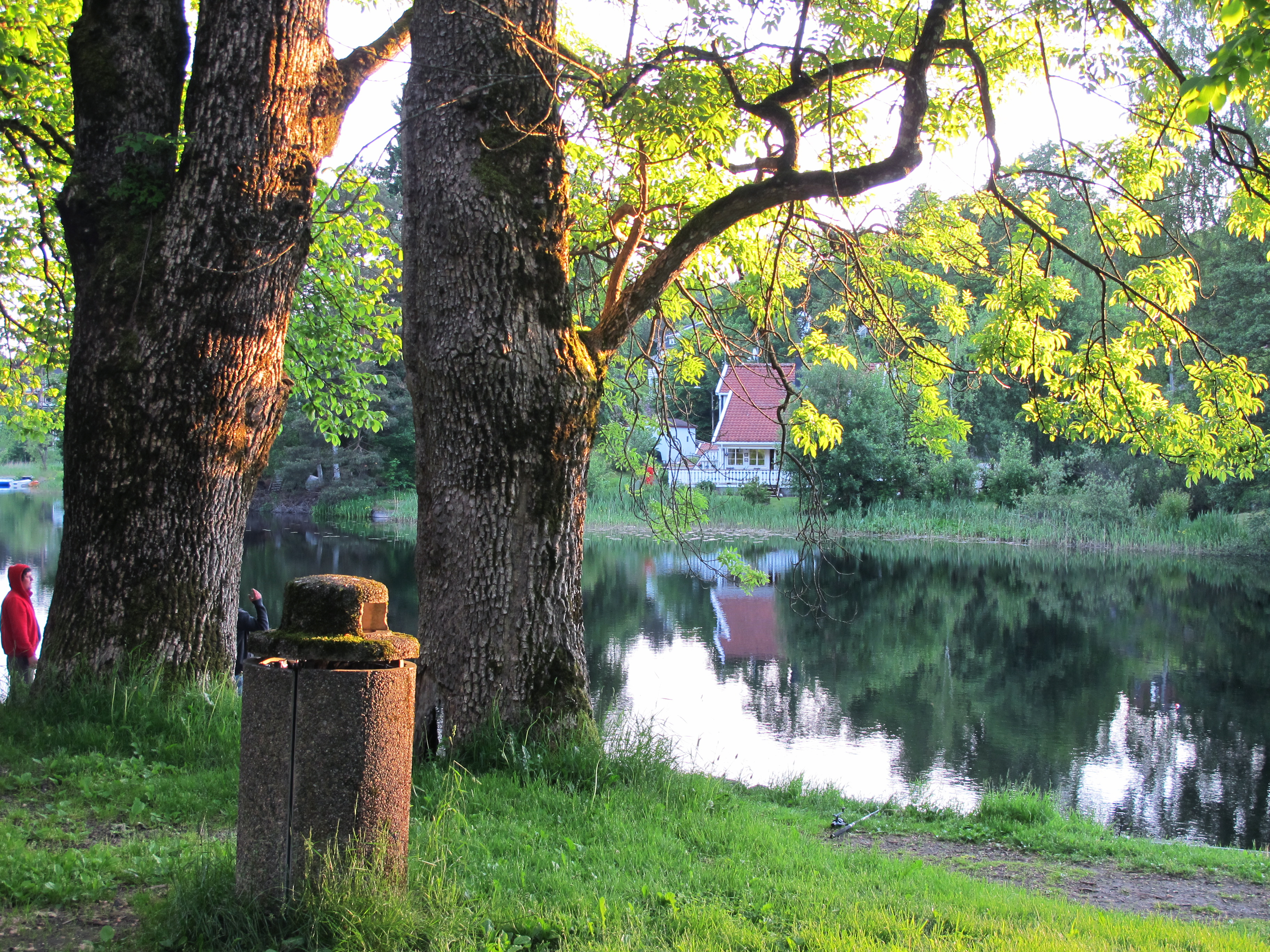 Langsæparken, store trestammer mot Langsævannet